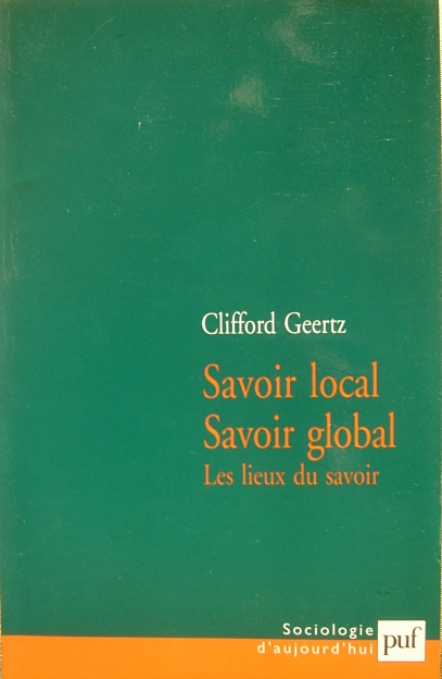 Couverture de : Savoir local, savoir global, Clifford Geertz